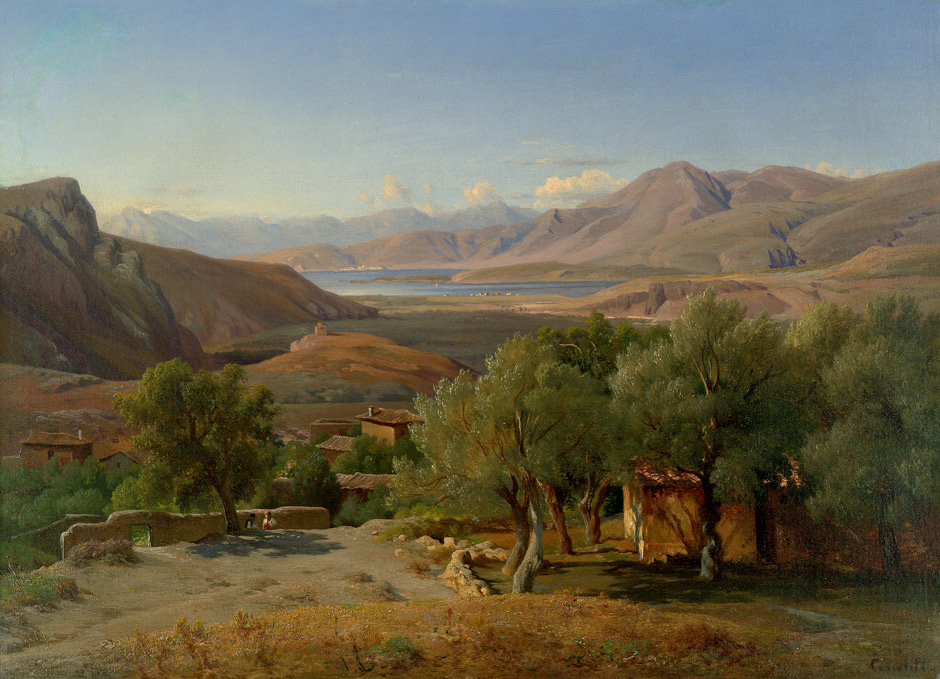 Blick von Chryso bei Delphi auf Itea am Golf von Korinth. Öl auf Papier, auf Leinwand kaschiert. 43 x 59 cm. Unten rechts in Schwarz signiert "Gurlitt", darunter in Rot ein weiteres Mal. Auf dem Keilrahmen eigenhändig bez. und signiert "Griechische Landschaft [...] Dorf Chrisso am Parnass [...] Louis Gurlitt."